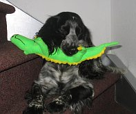 Verkleint en bewerkt detail van afbeelding.